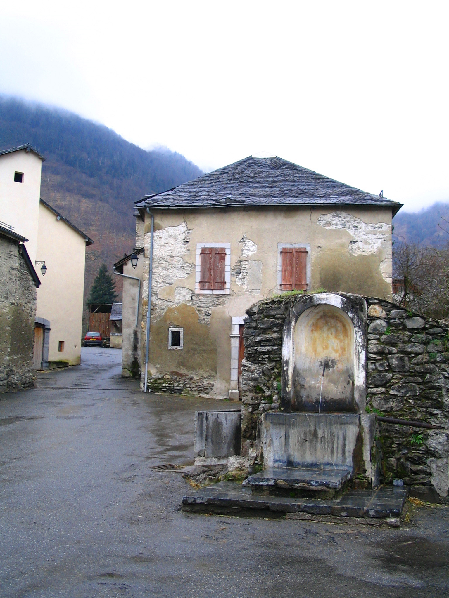 Rue de Laruns - Pyrénées Atlantiques - France Author:P.Charpiat 2007